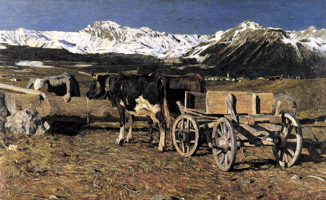 Kühe an der Tränke